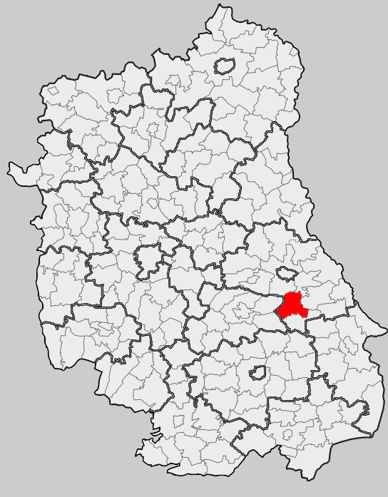 Map of gmina Leśniowice, Chełm county, Lublin voivodship Mapa gminy Leśniowice, powiat chełmski, województwo lubelskie